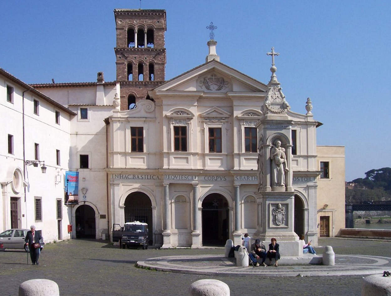 San Bartolomeo all'Isola, Isola Tiberina, Roma, Italy